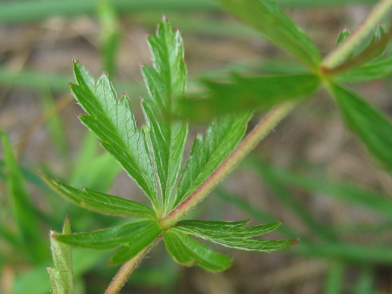 Blutwurz Potentilla erecta, Zingst